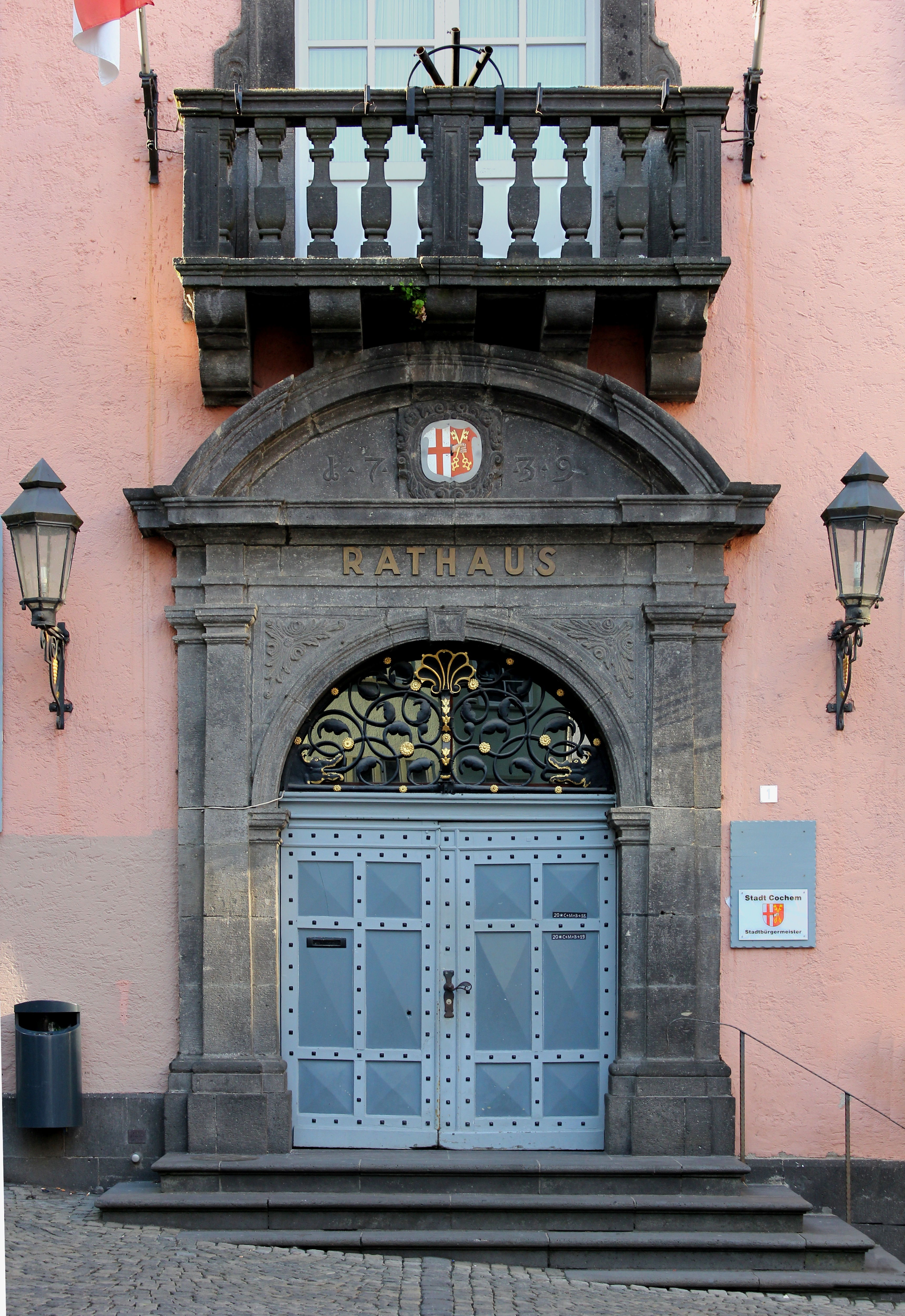 Rathaus Cochem, Portal von 1739